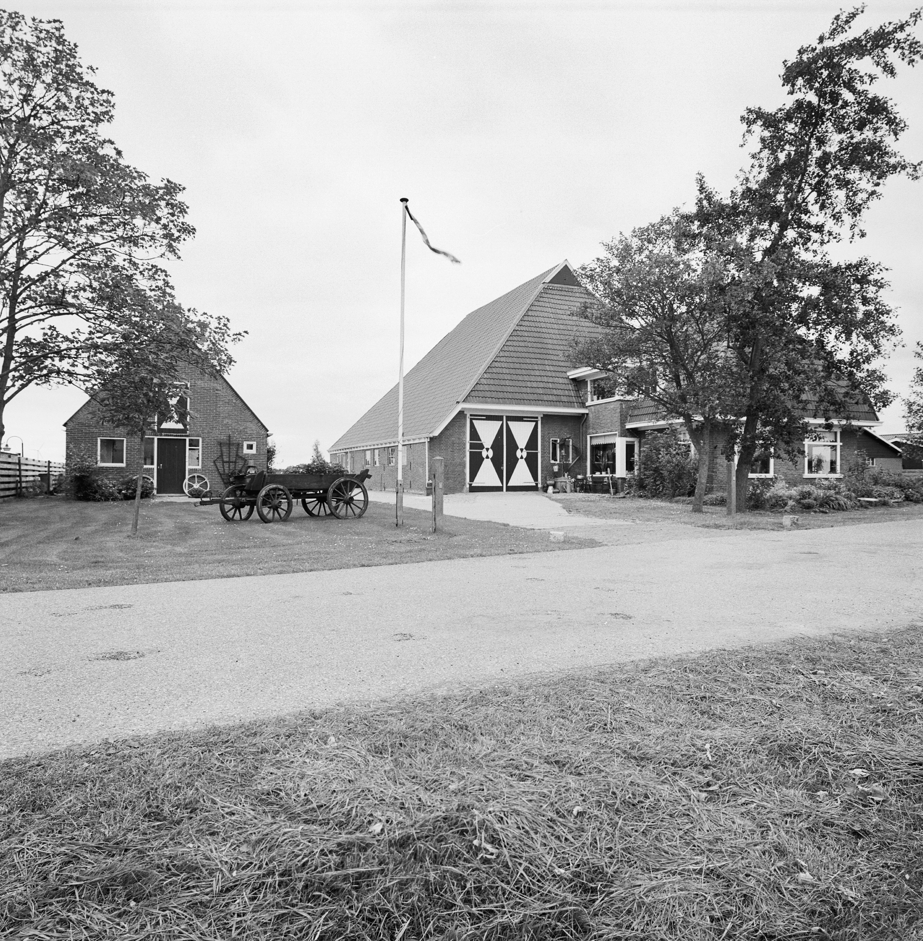 Kop-rompboerderij/ Expressionisme: Overzicht voorzijde (opmerking: Monumenten In Nederland Friesland)